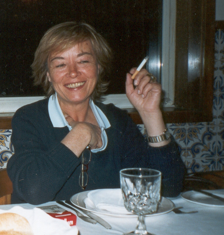 Helga Moreira